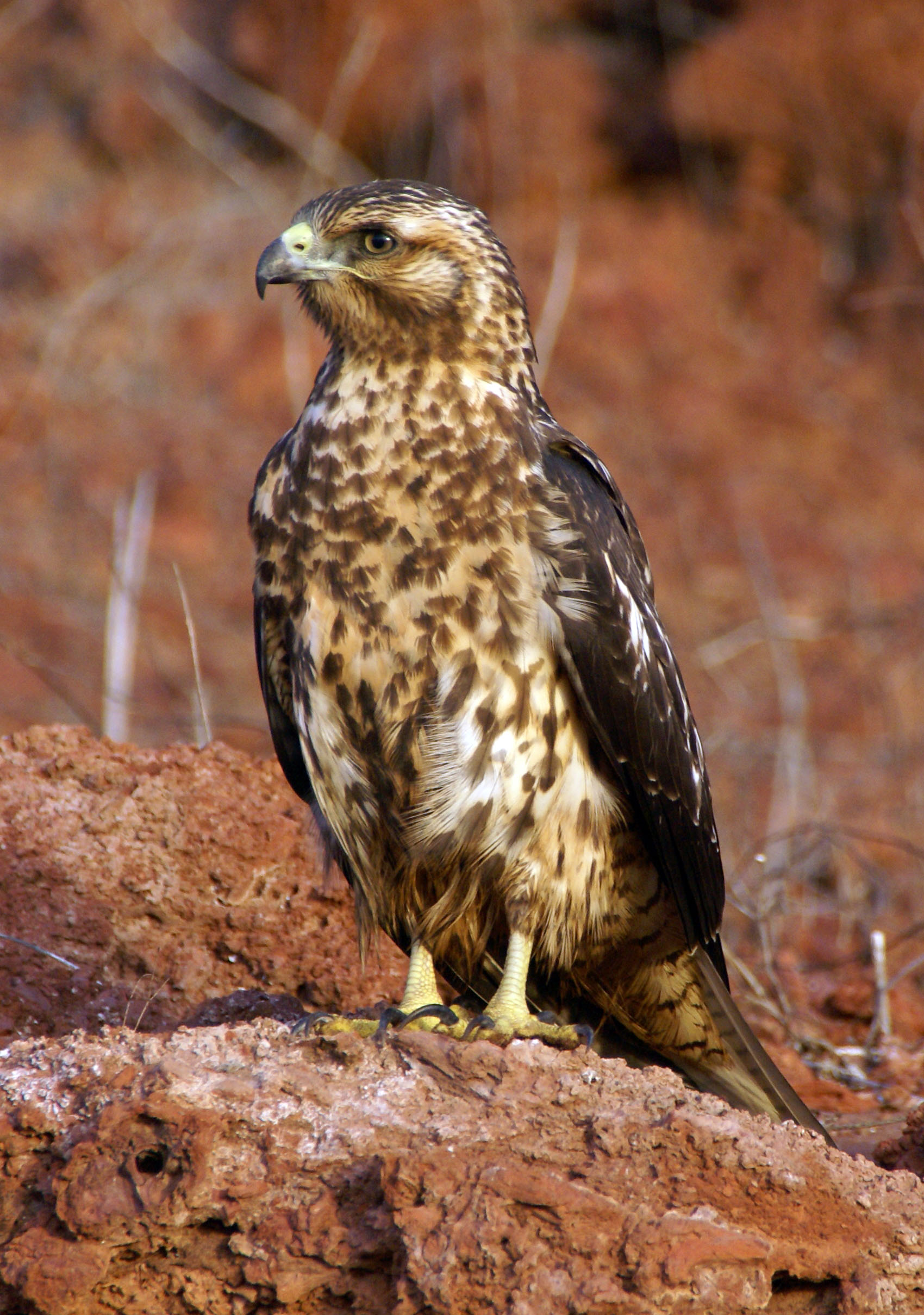 A juvenile Galapagos Hawk (Buteo galapagoensis), Rabida island.juvenile Galapagos hawk Rabida